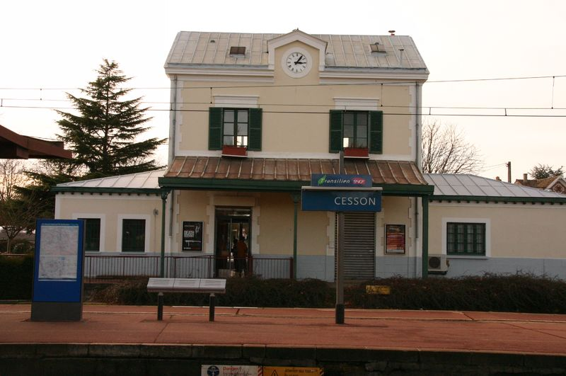 Gare de Cesson